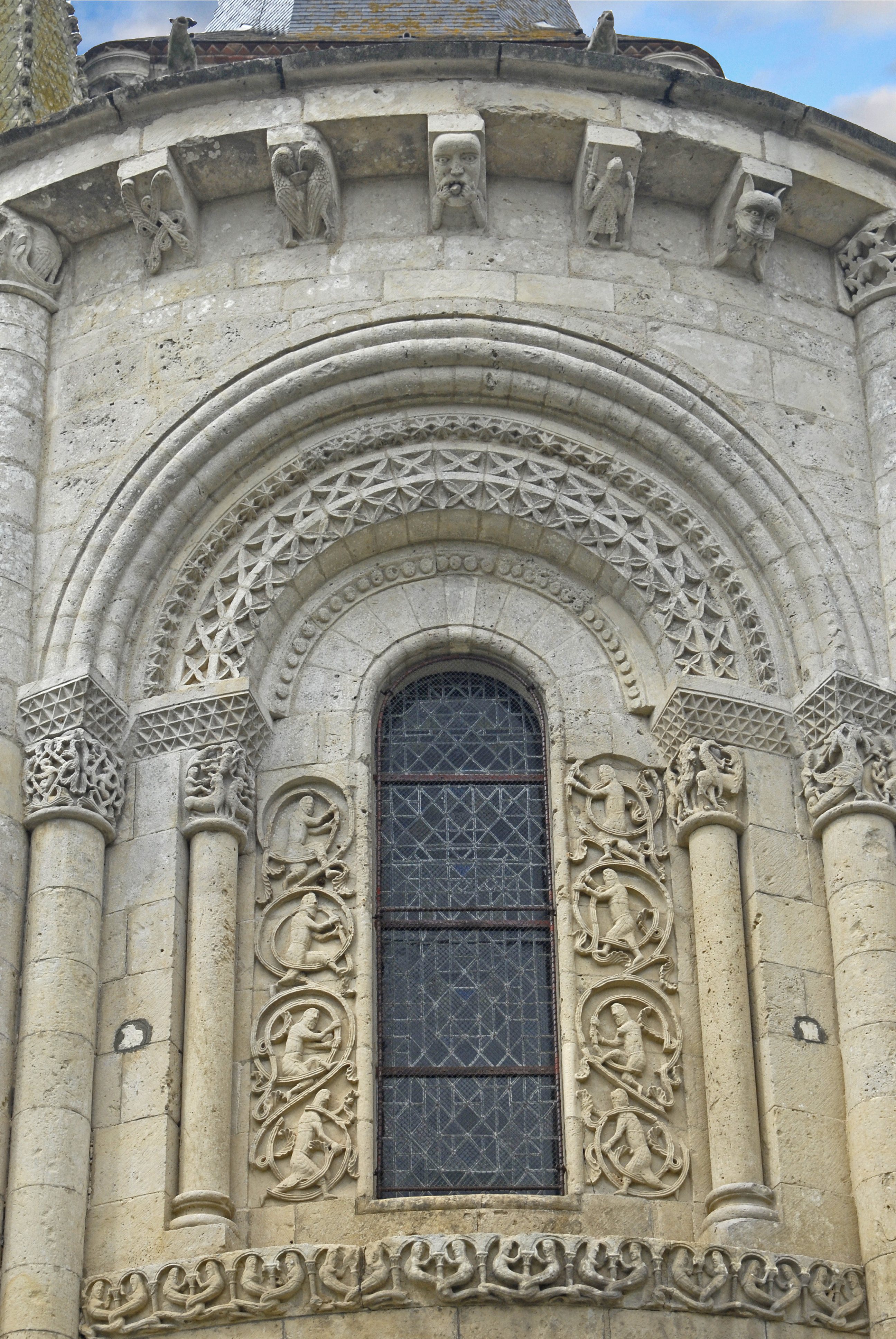 St.-Pierre-Aulnay, Zentrales Fenster in der Chorapsis